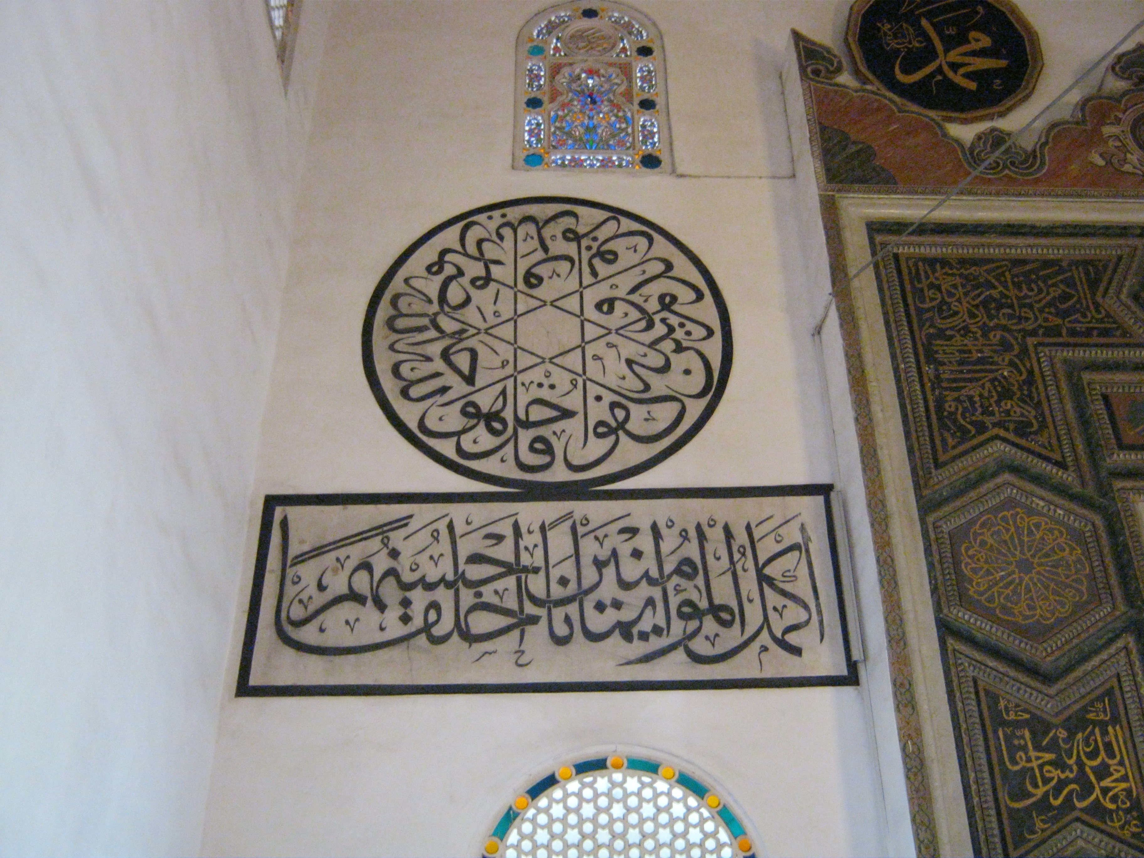 Yıldırım Bayezid Camii Bursa